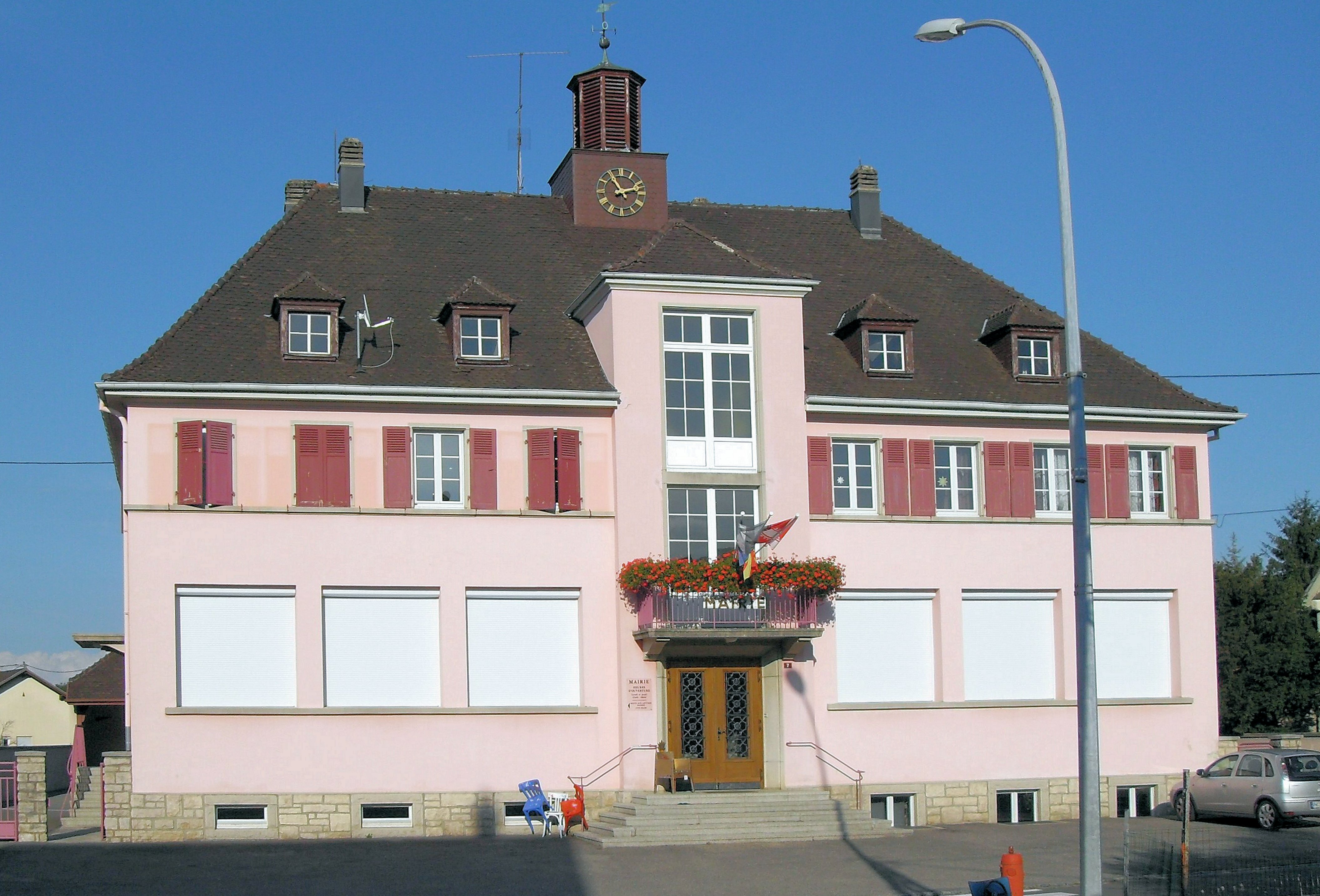 La mairie de Raedersdorf